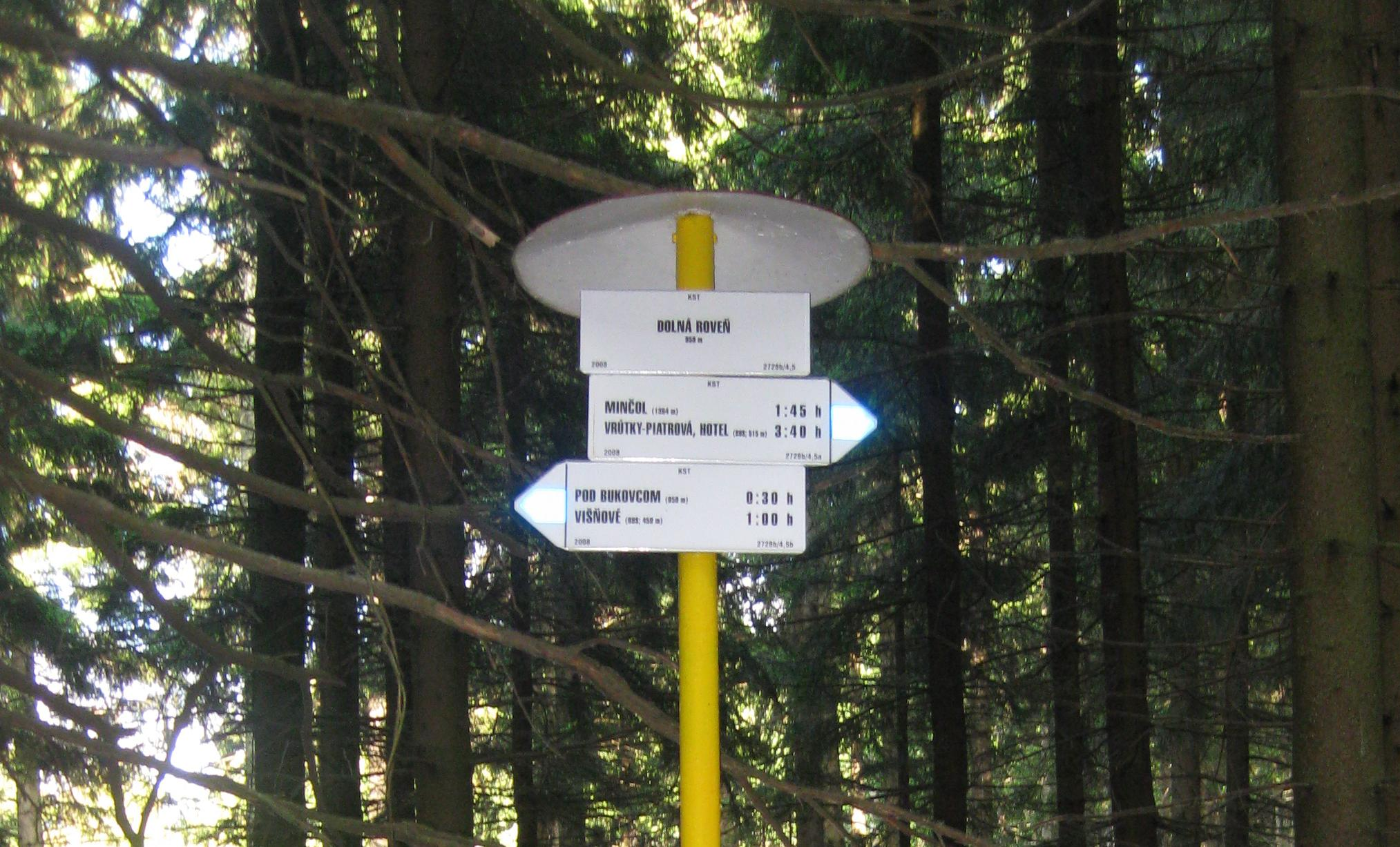 Dolna roven chodník